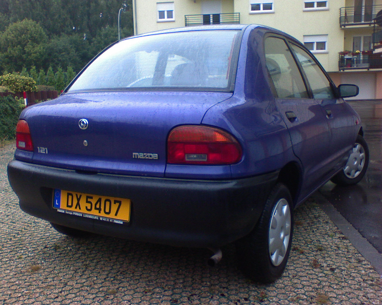 Mäi Mazda 121 (1996) vun hannen op engem private Parking zu Schëffleng.